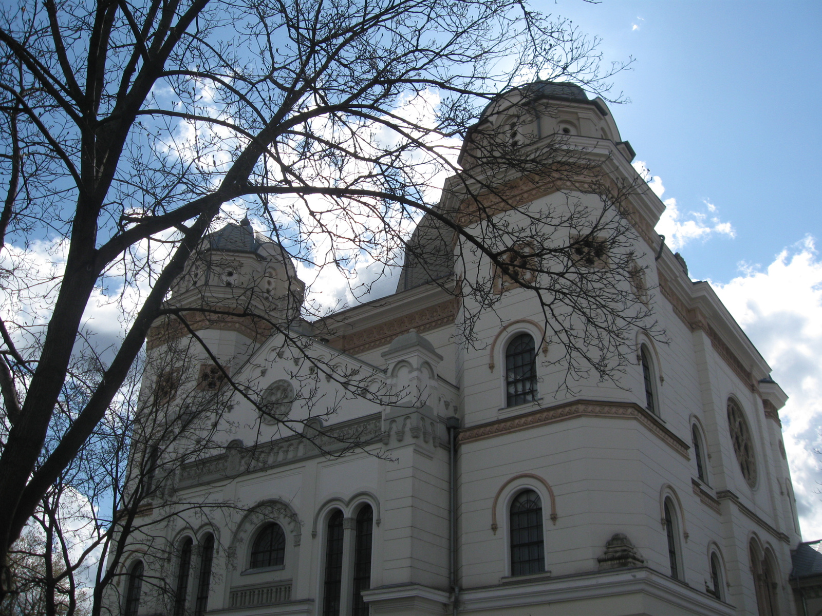 Zsinagóga (Győr, Kossuth Lajos u. 5.)